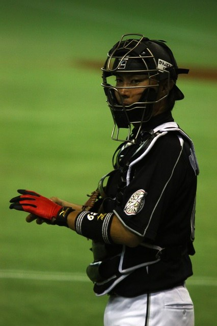 日本プロ野球 千葉ロッテマリーンズ 金澤岳 捕手